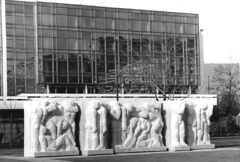 ADN-ZB-Link-3.4.86-zin-Berlin: Arbeitsmaterial zum Marx-Engels-Forum. Die Gestaltung der repräsentativen Denkmalsanlage übernahm auch der Bildhauer Werner Stötzer mit einem Relief. Die Marmorarbeit ist 2.20m hoch und 10m lang. Sie zeigt eine Menschengruppe, deren Existenz von Ausbeutung und Unterdrückung geprägt wird.